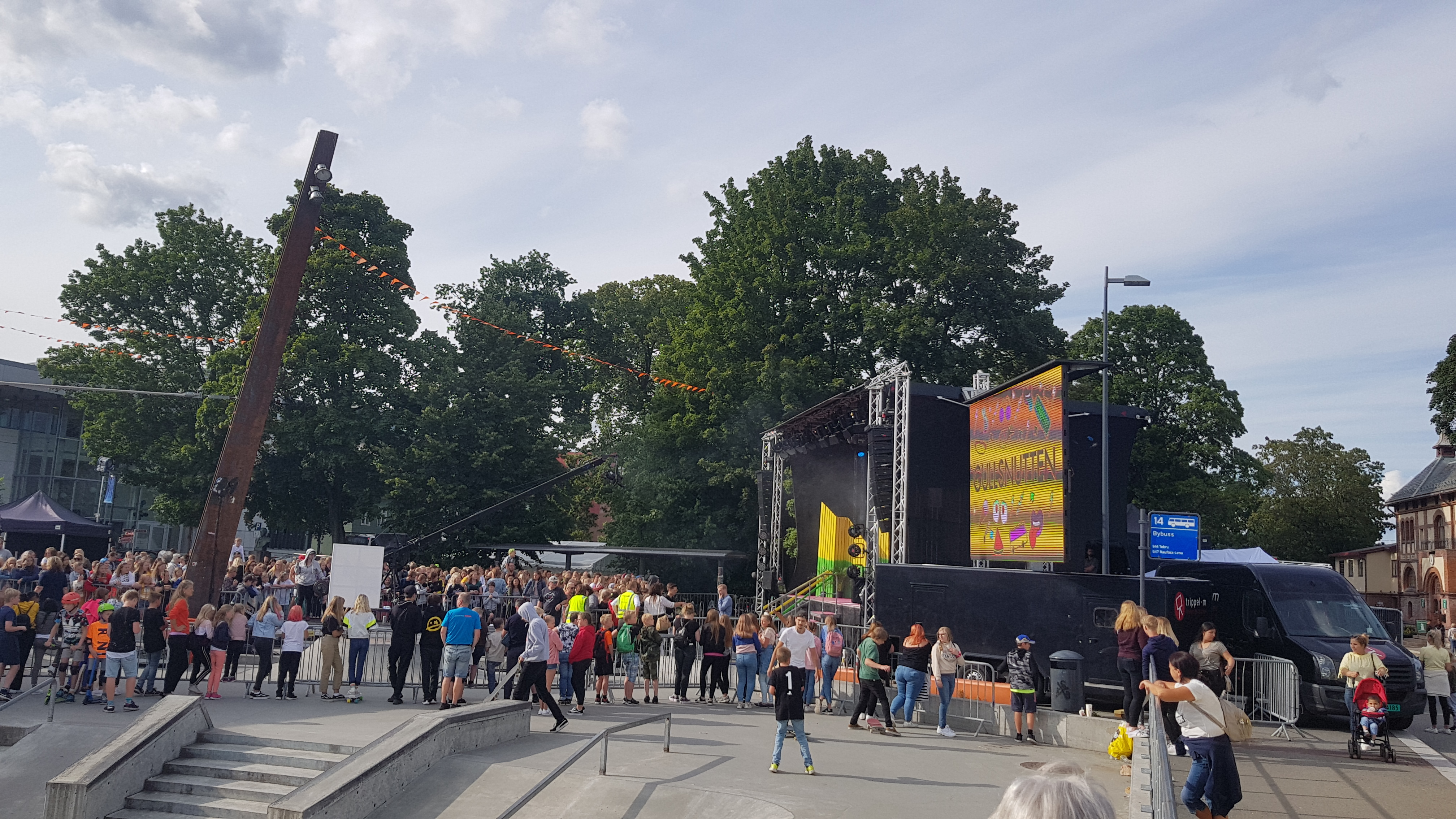 From Gullsnutten 2019 at Gjøvik.